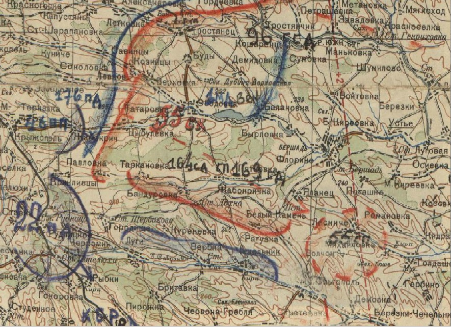 Положение на одном из участков ЮФ 28.07.1941